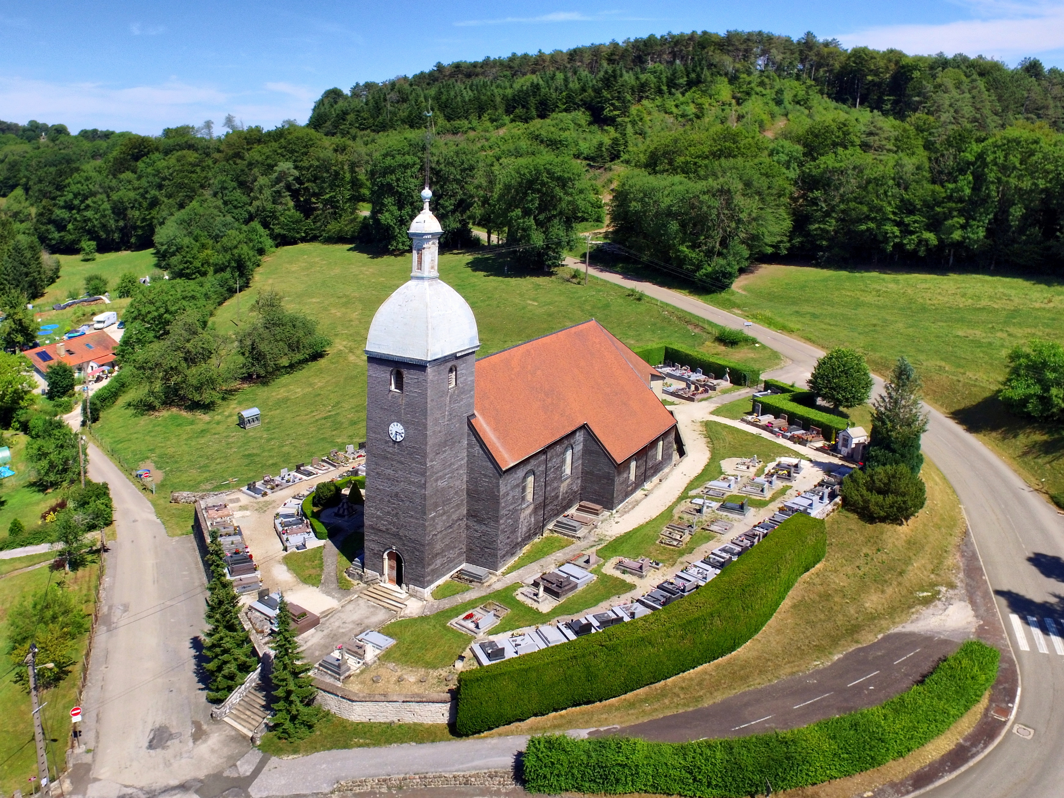 Église Saint-Maurice de Gonsans .